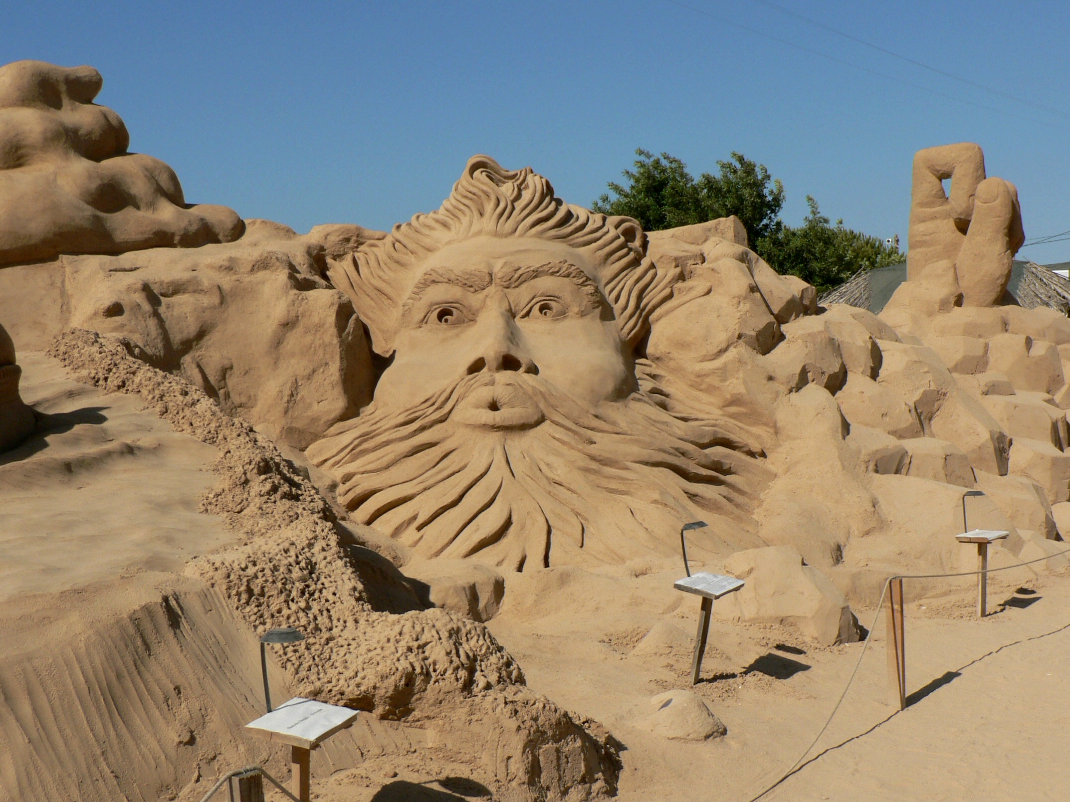 Escultura em areia Adamastor sand sculpture in Pera, Algarve - FIESA 2007